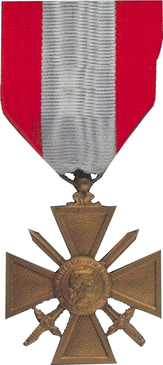 Croix de guerre des théatres d'opérations extérieurs